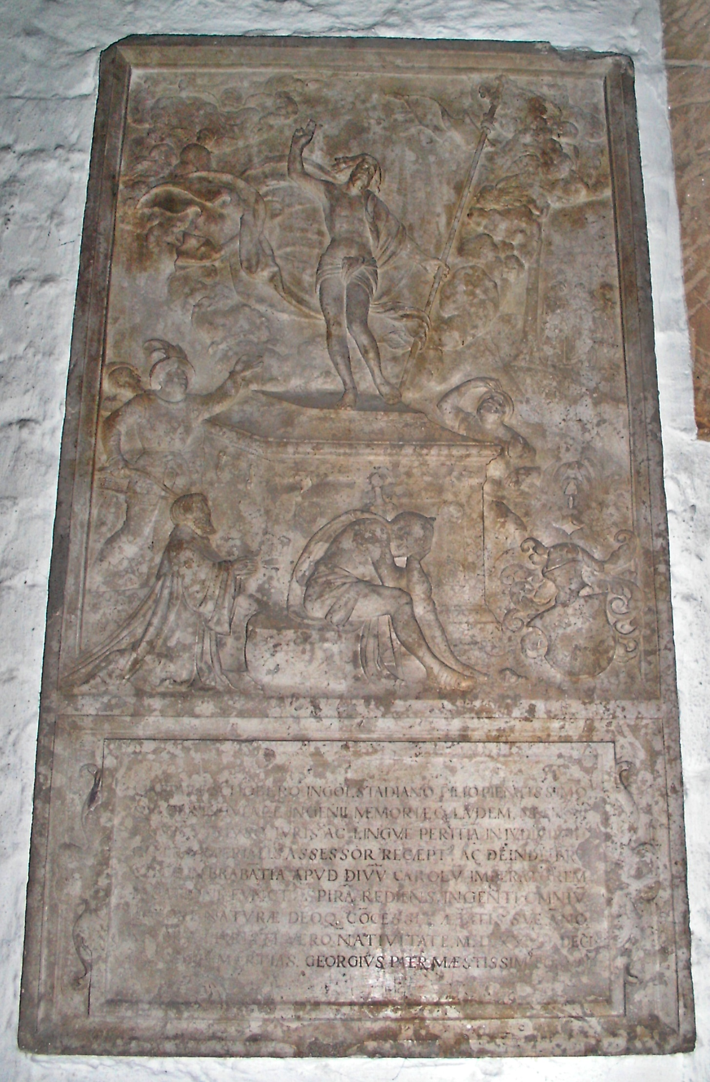 Caspar Schober (1504-1532), Richter am Reichskammergericht, Epitaph im Speyerer Dom.